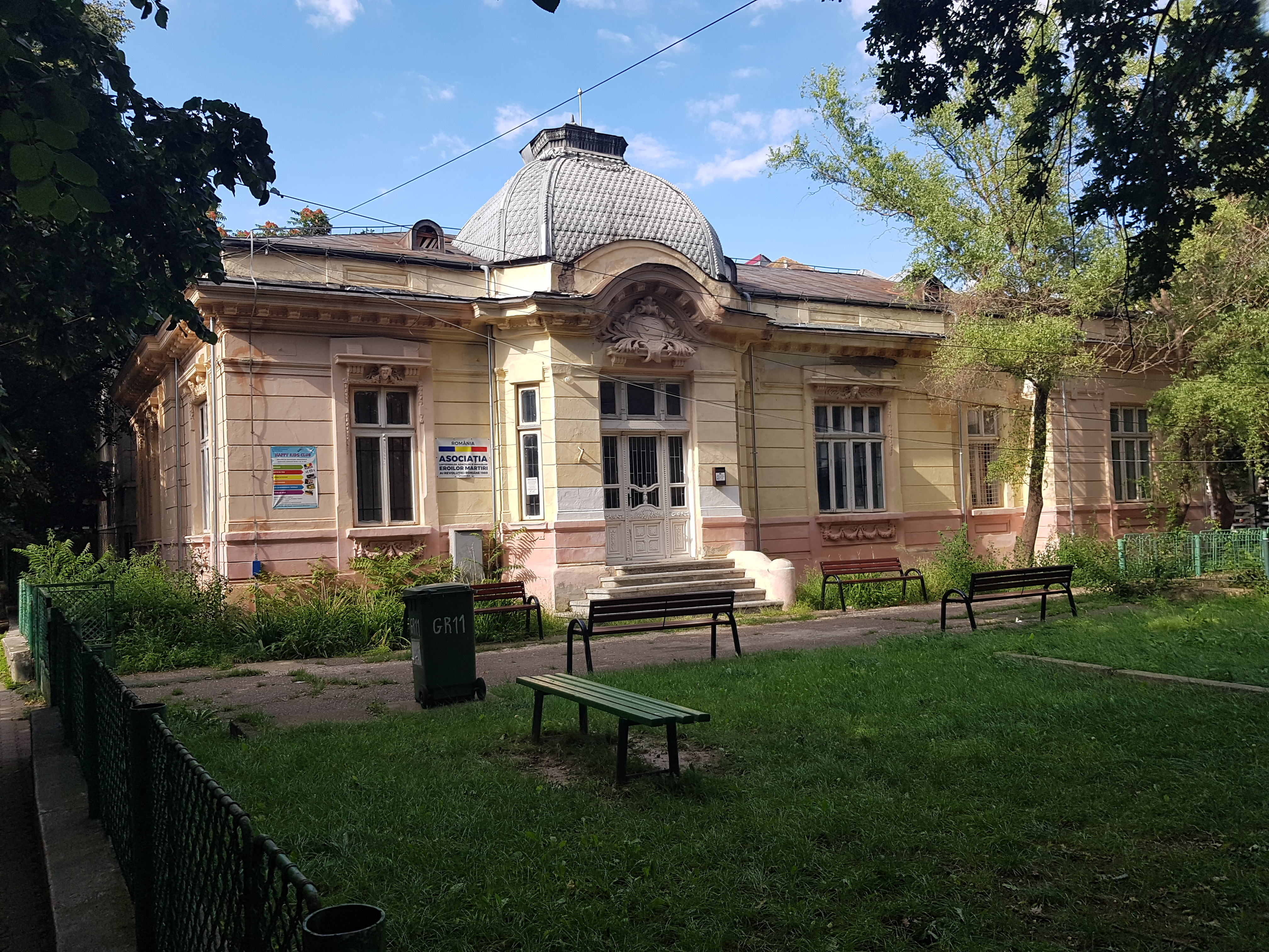 Casa Zaharia